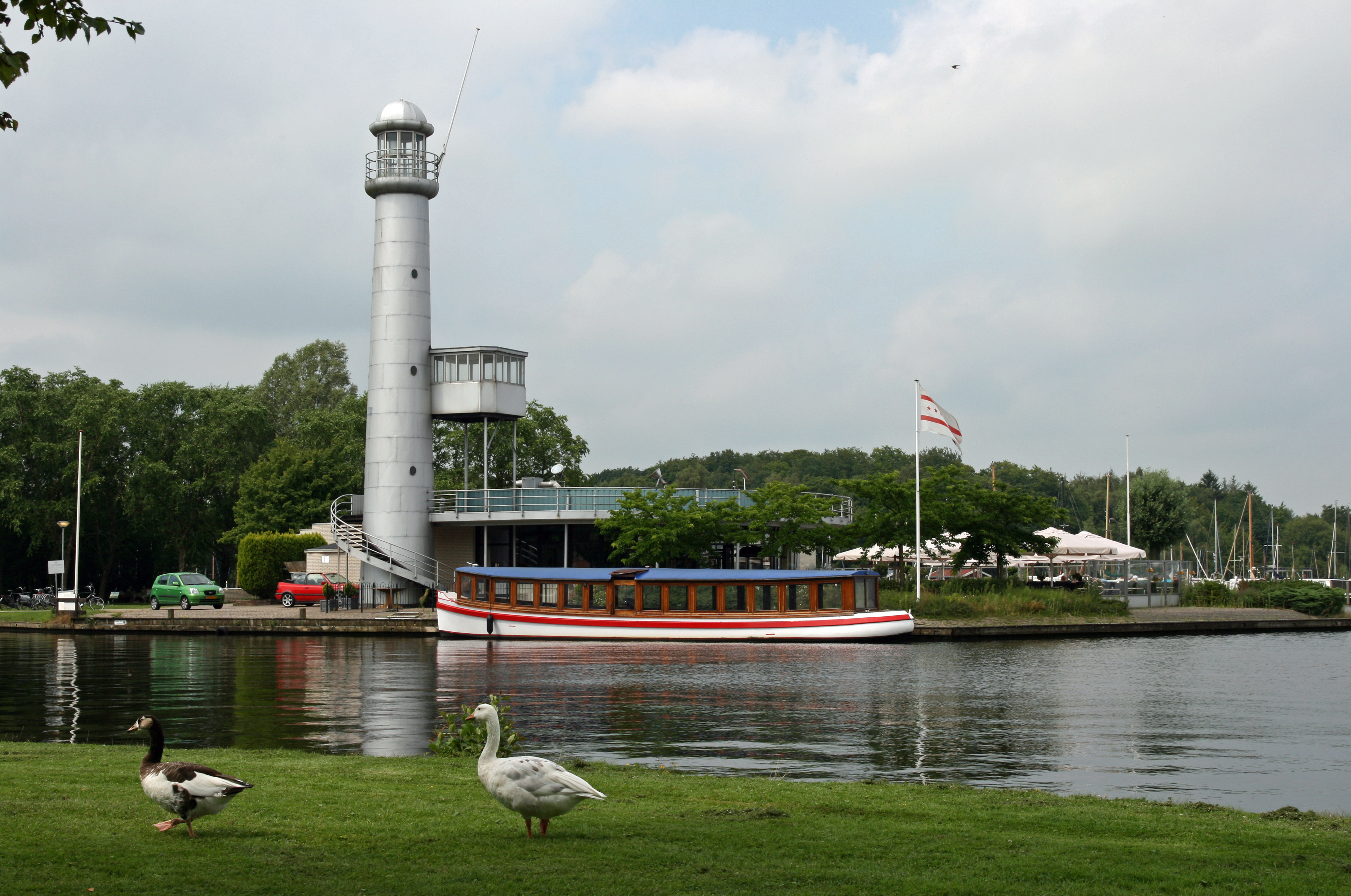 "De Twee Provincieën" Paterswoldsemeer